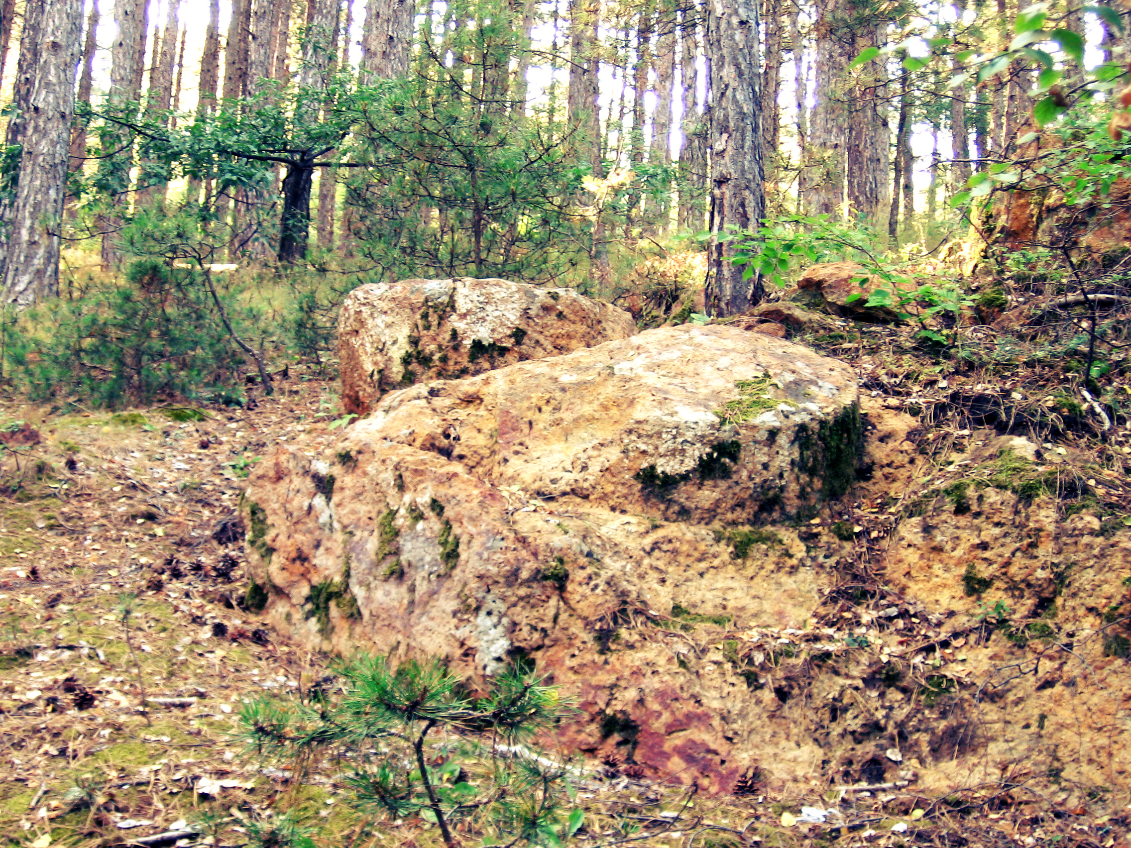 Мегалитното съоръжение на Бърдото, гр.Брезник, България